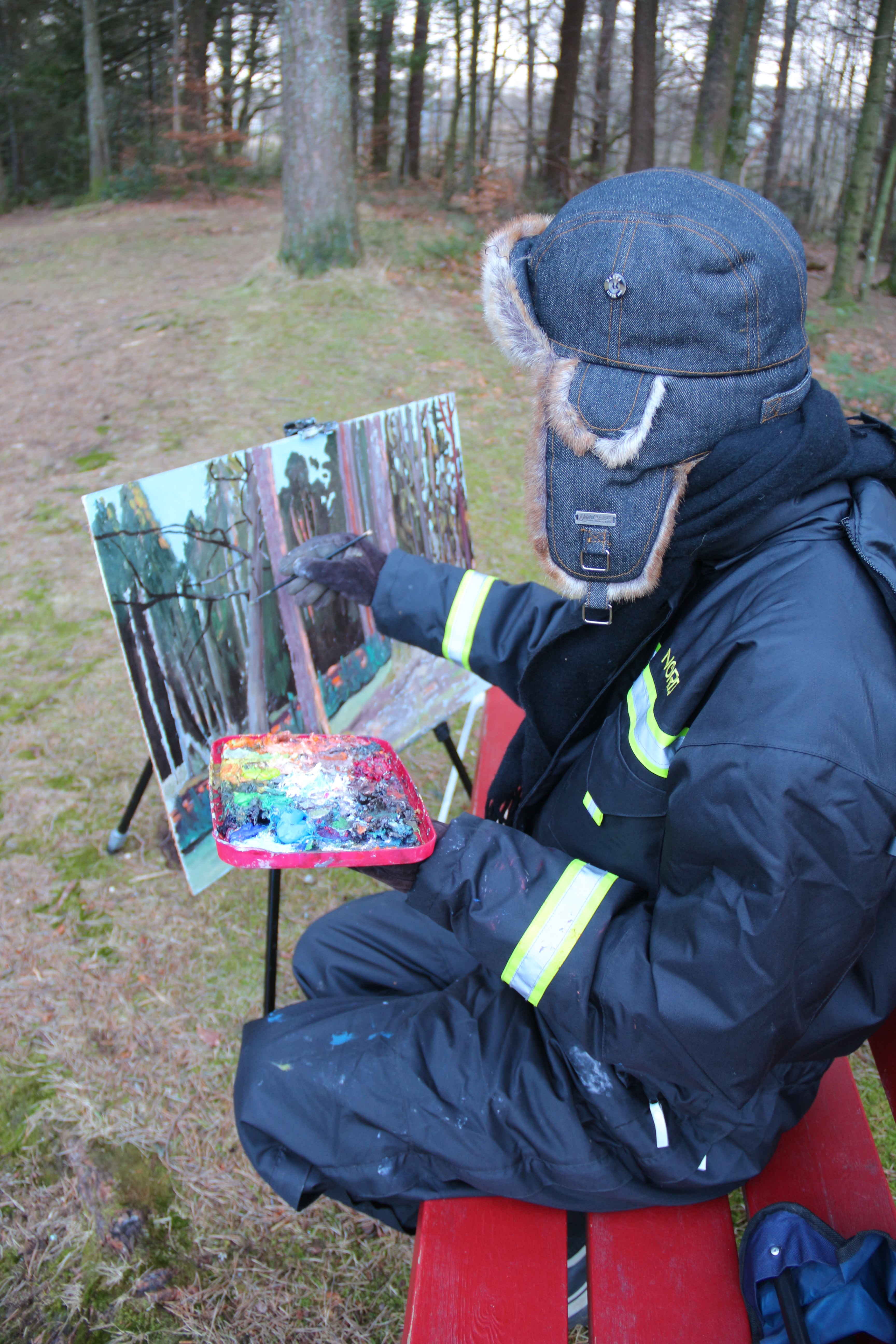 Amund Gravdal maler utendørs